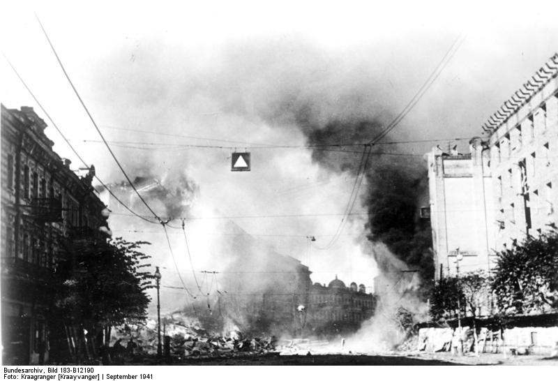 Scherl Bilderdienst An der Sowjetfront: (Ukraine) Riesenbrand in der Hauptstrasse von Kiew. Als Ursache wird die Explosion einer sowjetischen Höllenmaschine angesehen. PK-Aufnahmen: Kriegsberichter: Kraayvanger 9055-41 Sept. 1941